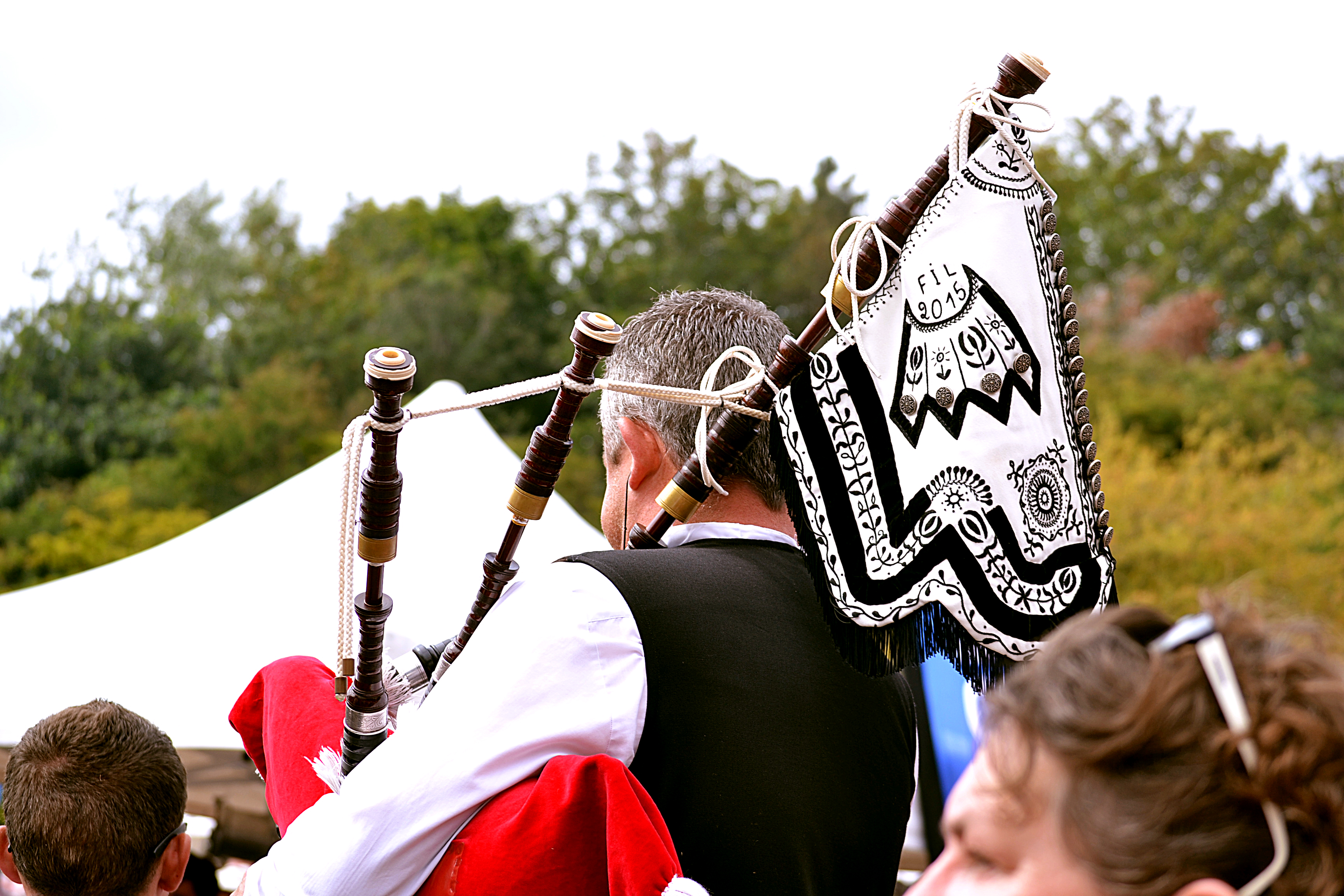 Le Bagad Cap Caval au festival Gouel an Eost à Plougoulm (Finistère) le 9 août 2015.